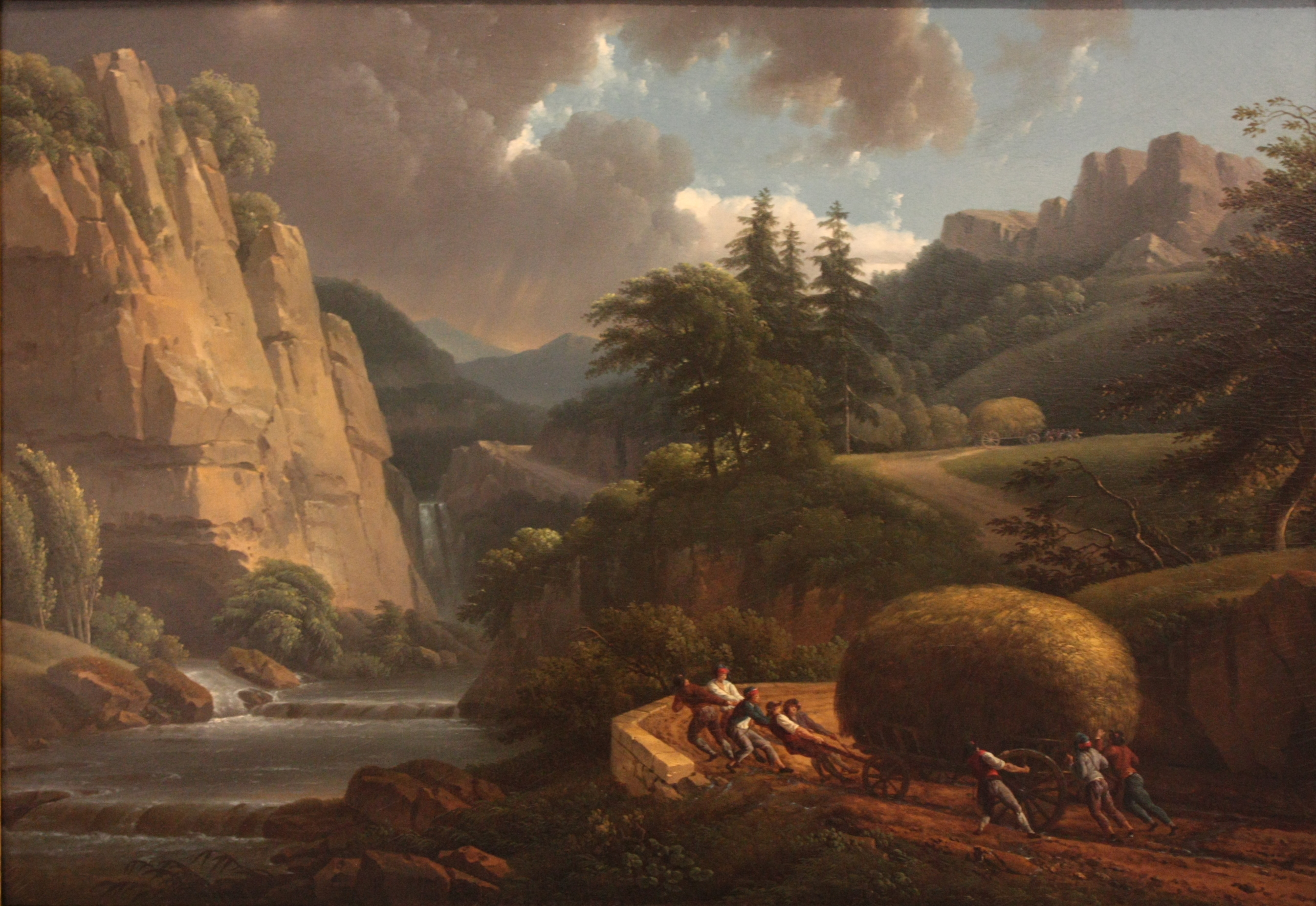 "Les citoyens de Remiremont conduisant les voitures de fourrage à l'armée du Rhin" par Alexandre-Hyacinthe Dunouy, vers 1794